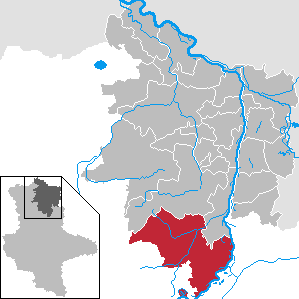 Tangerhütte im Landkreis Stendal, Sachsen-Anhalt